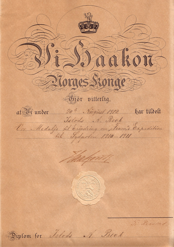 Diplom tildelt Andreas Beck i forbindelse med utdelingen av Sydpolmedaljen